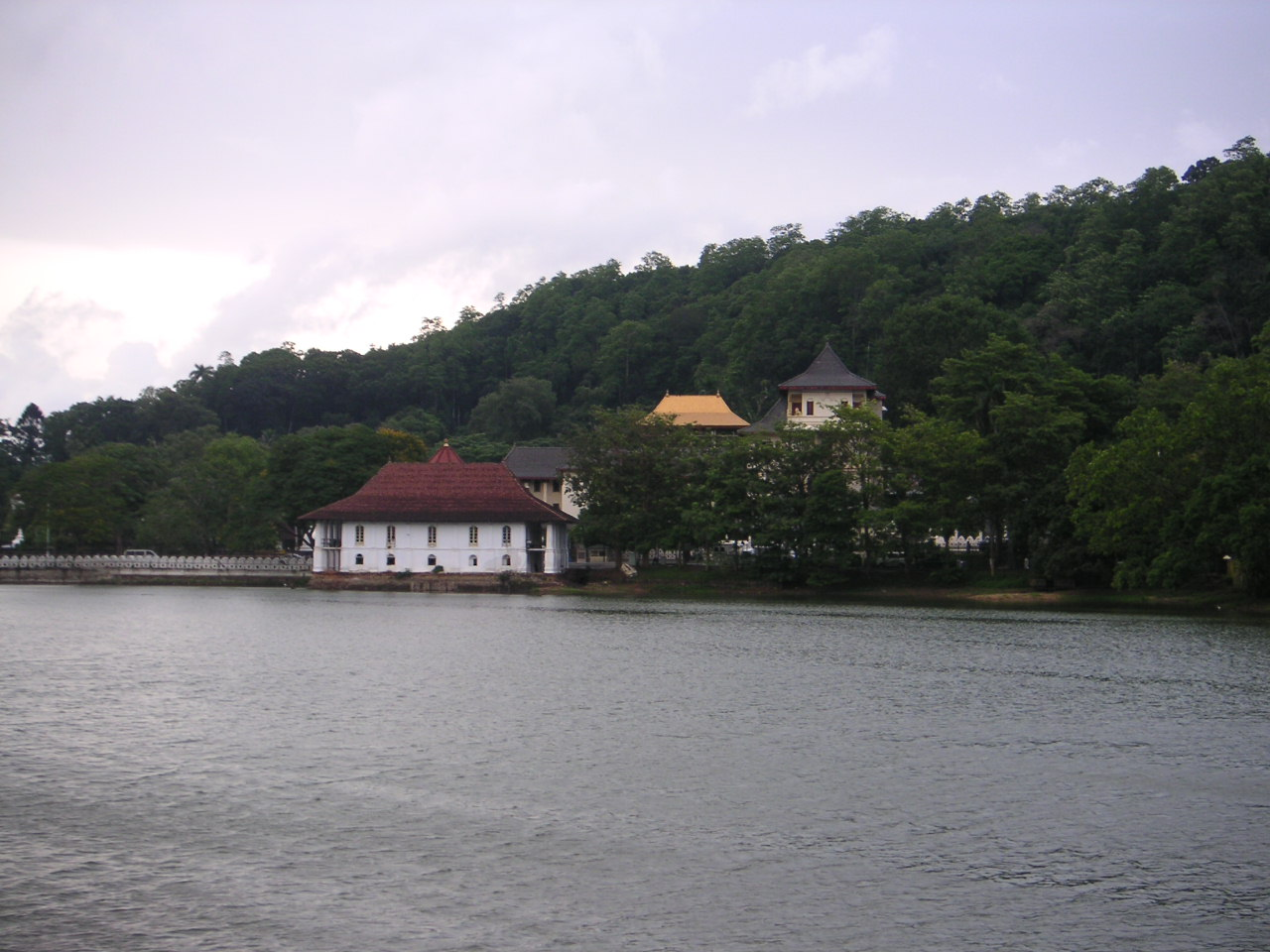 Kandy, Sri Lanka. Photo: Soman